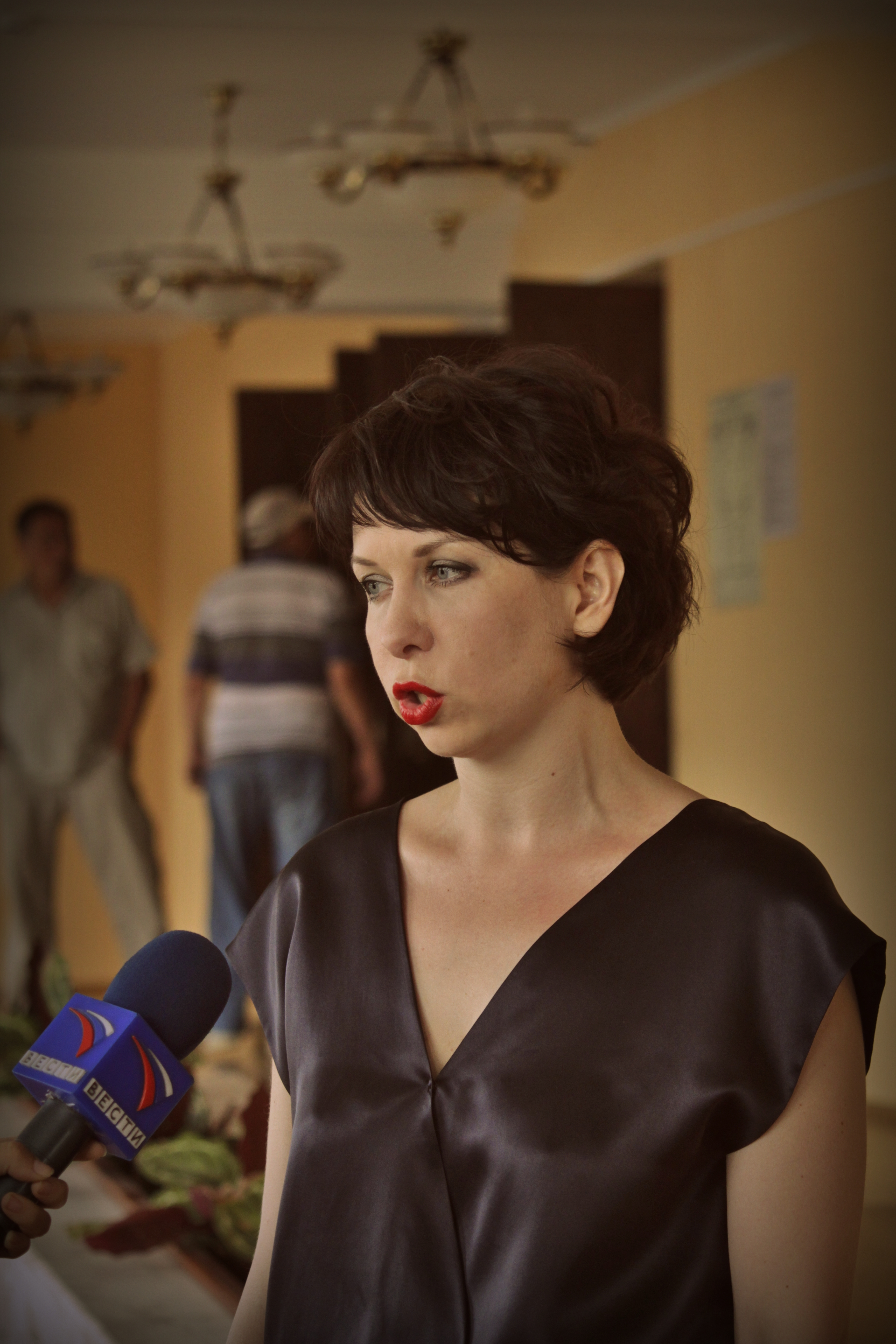 Nataly Ulanova, Director of the international music festival "Voice of nomads". Russia, Buryatia. July 2012